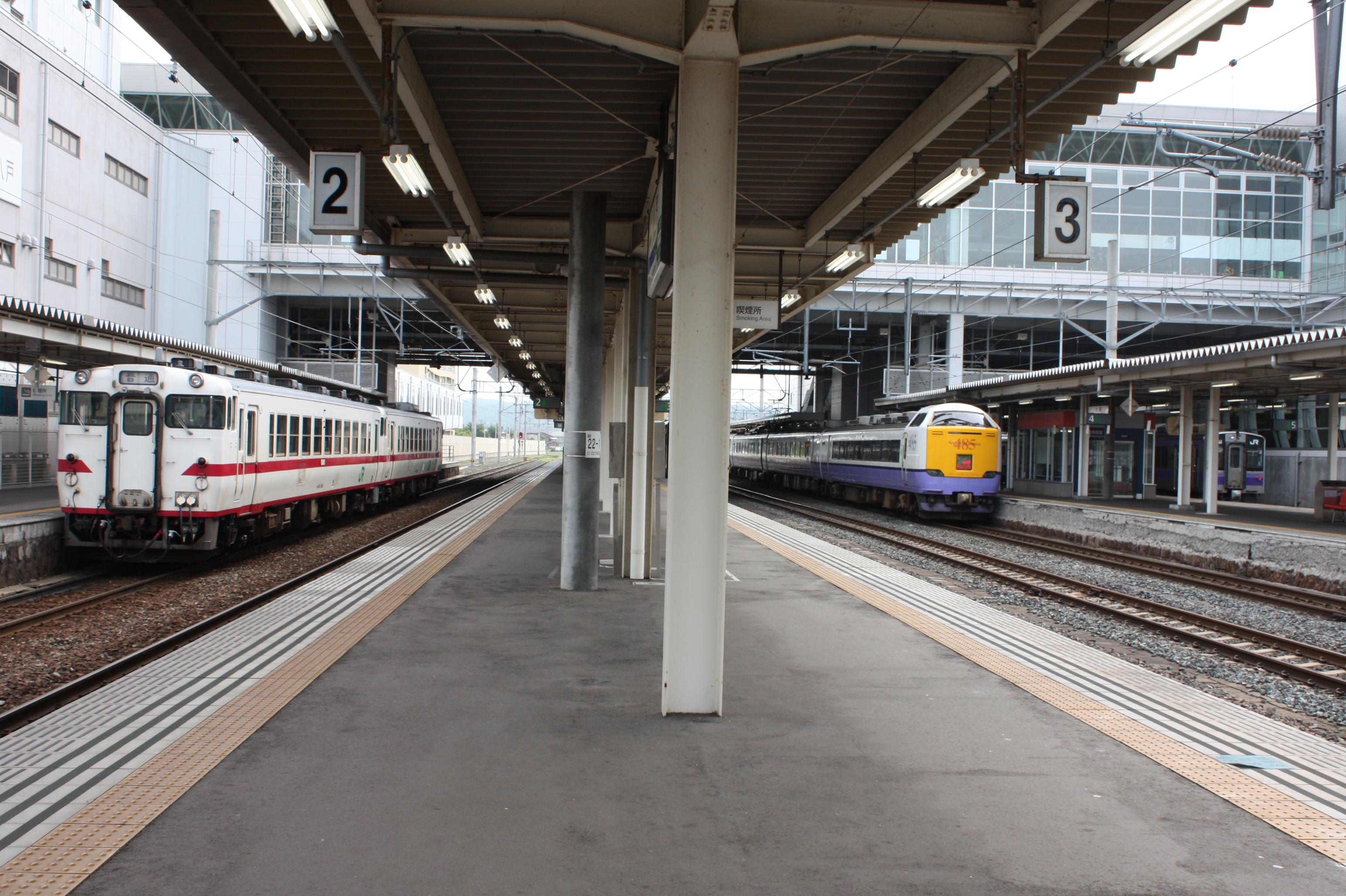 八戸駅在来線ホーム